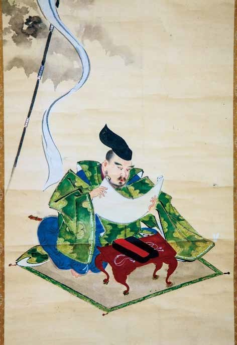 郡宗保の肖像。